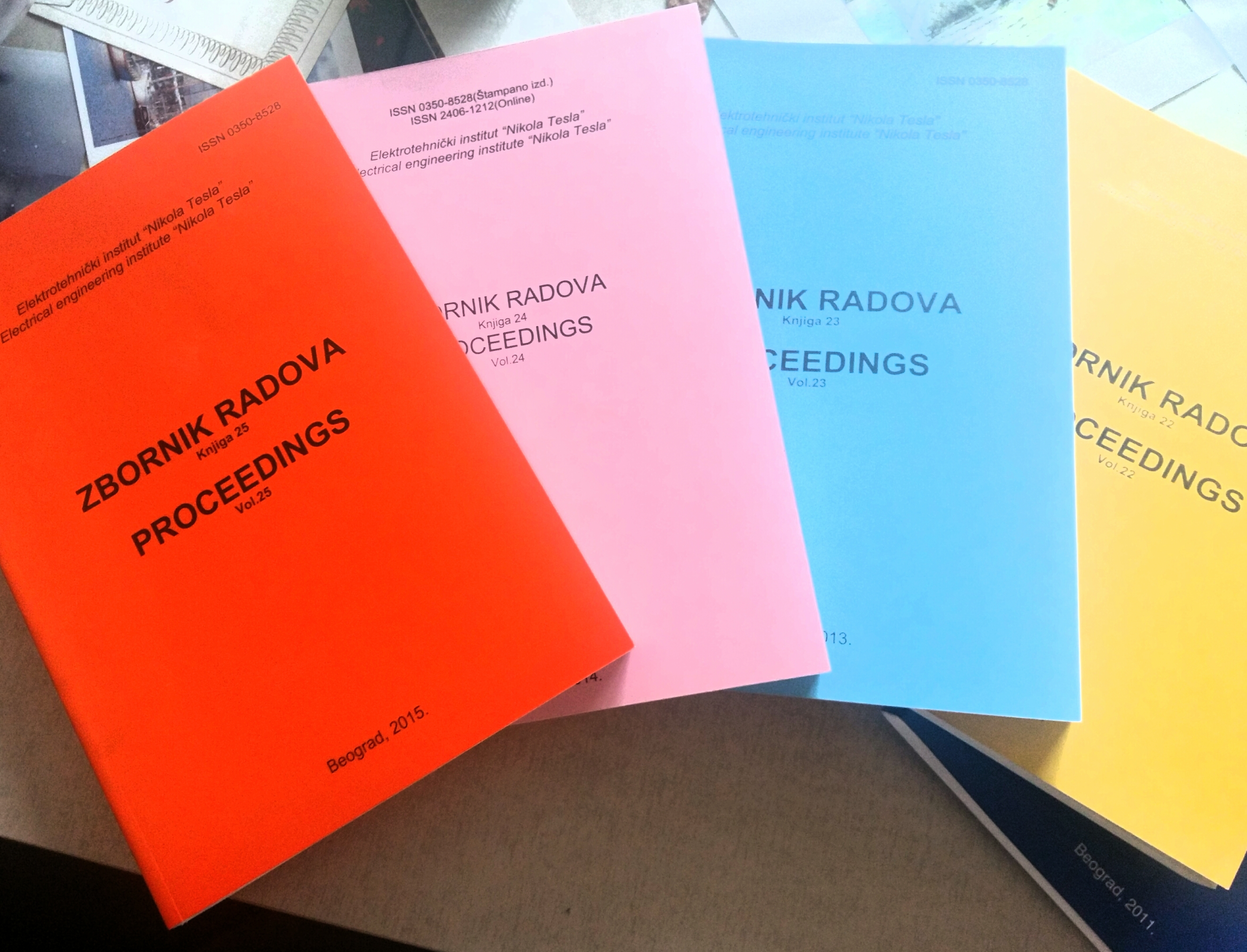 Штампане корице Зборника